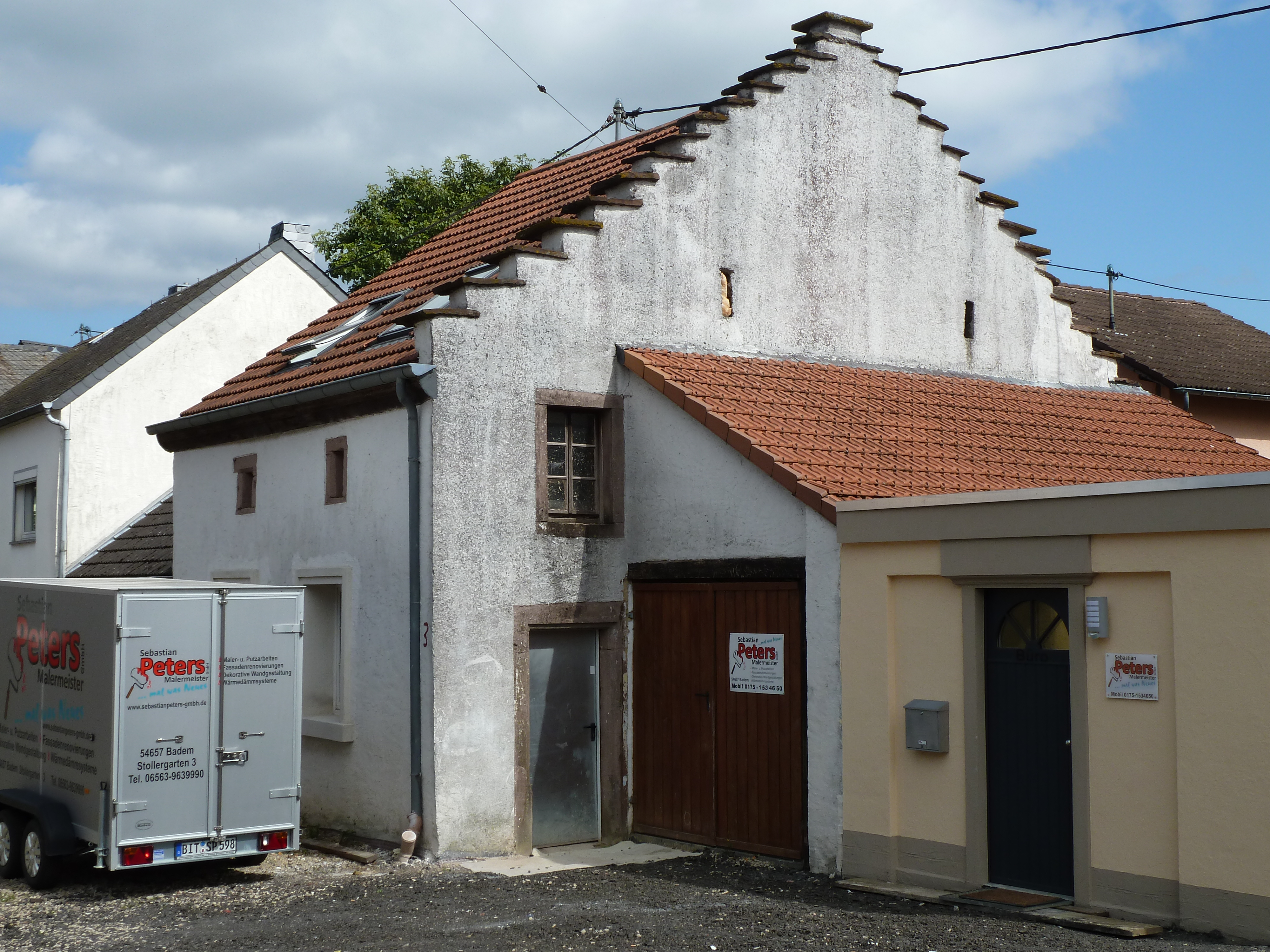 Flurküchenhaus mit Treppengiebel, Stollergarten 3, im Badem